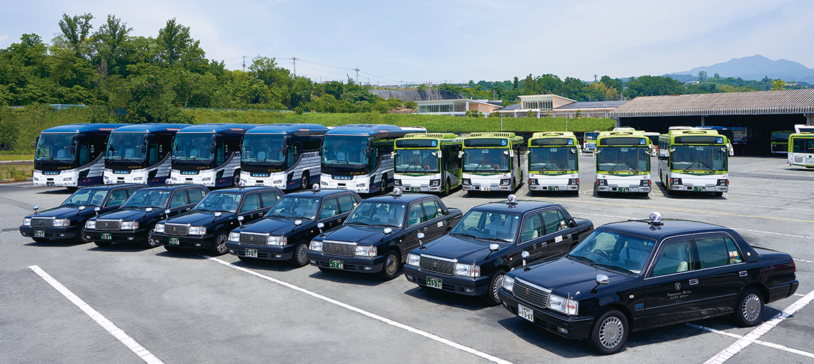 統合完了の記念としてバス・タクシーのパノラマ写真を撮影しました。